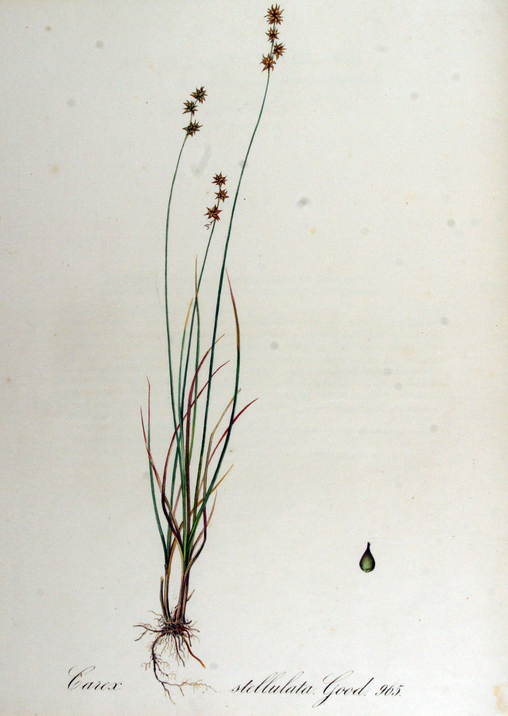 Carex echinata Murray (Syn. Carex stellulata Good.)